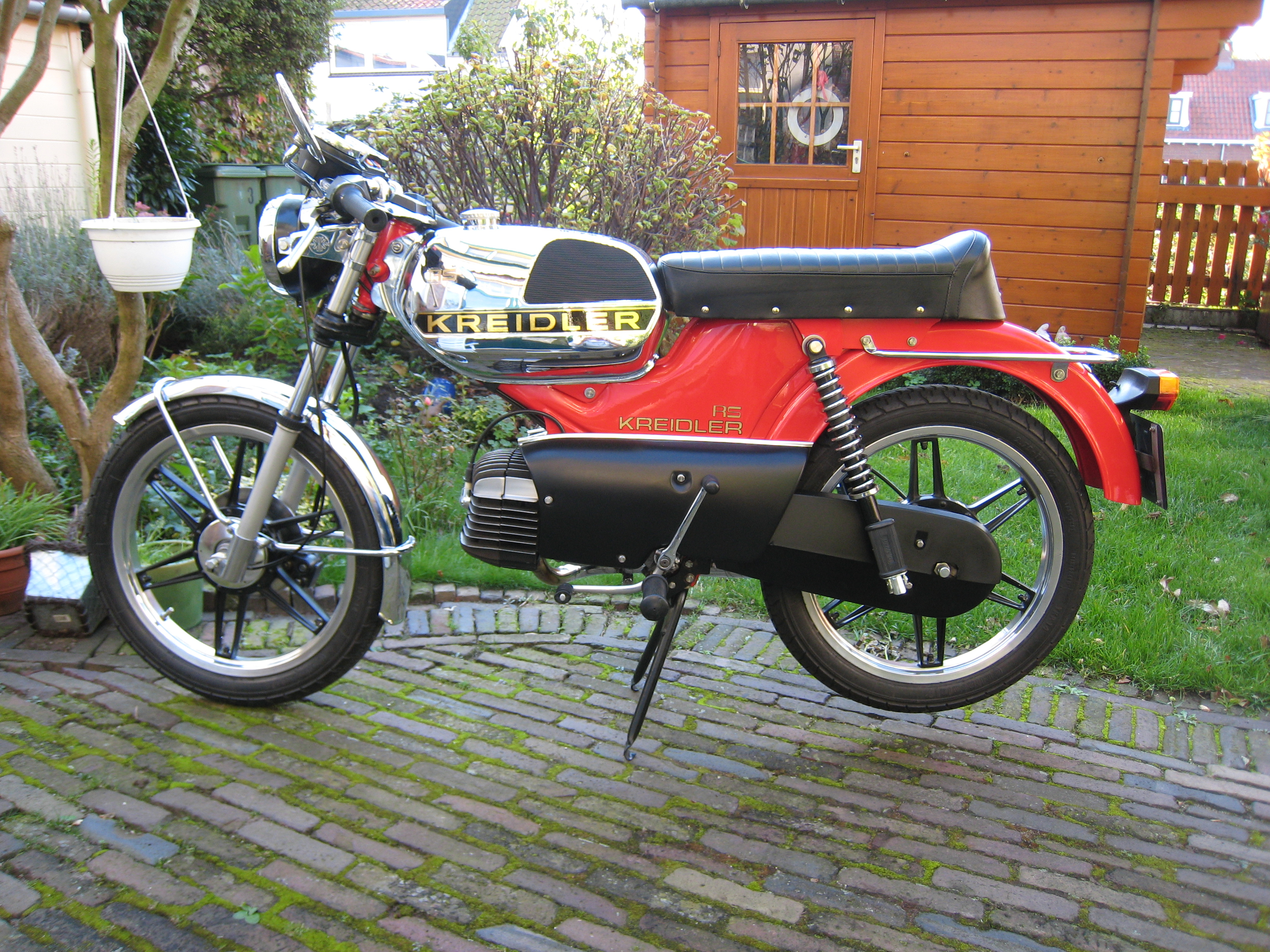 Red Kreidler RS K54.